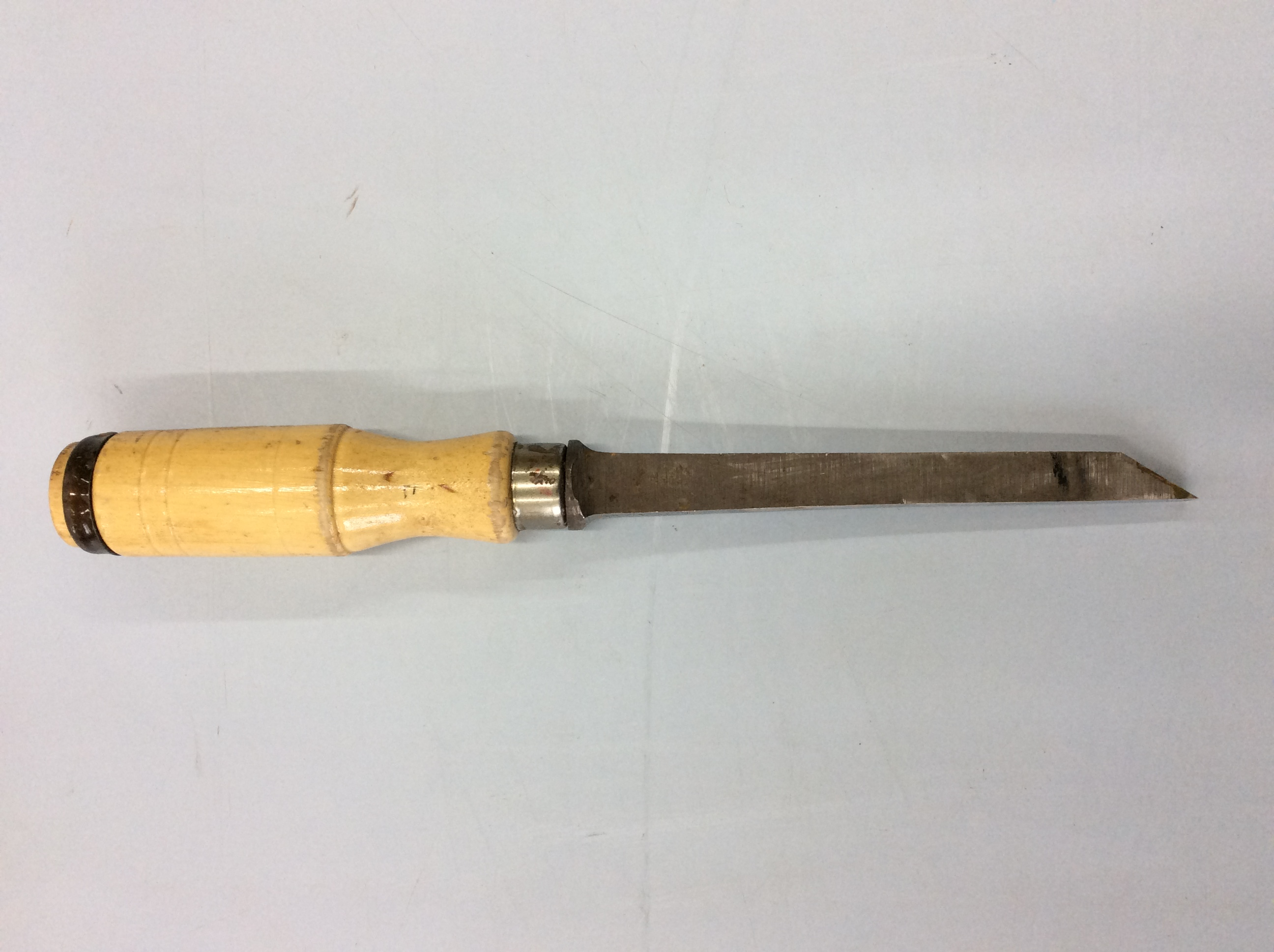 Permet d'évider le bois pour la réalisation des mortaises notamment